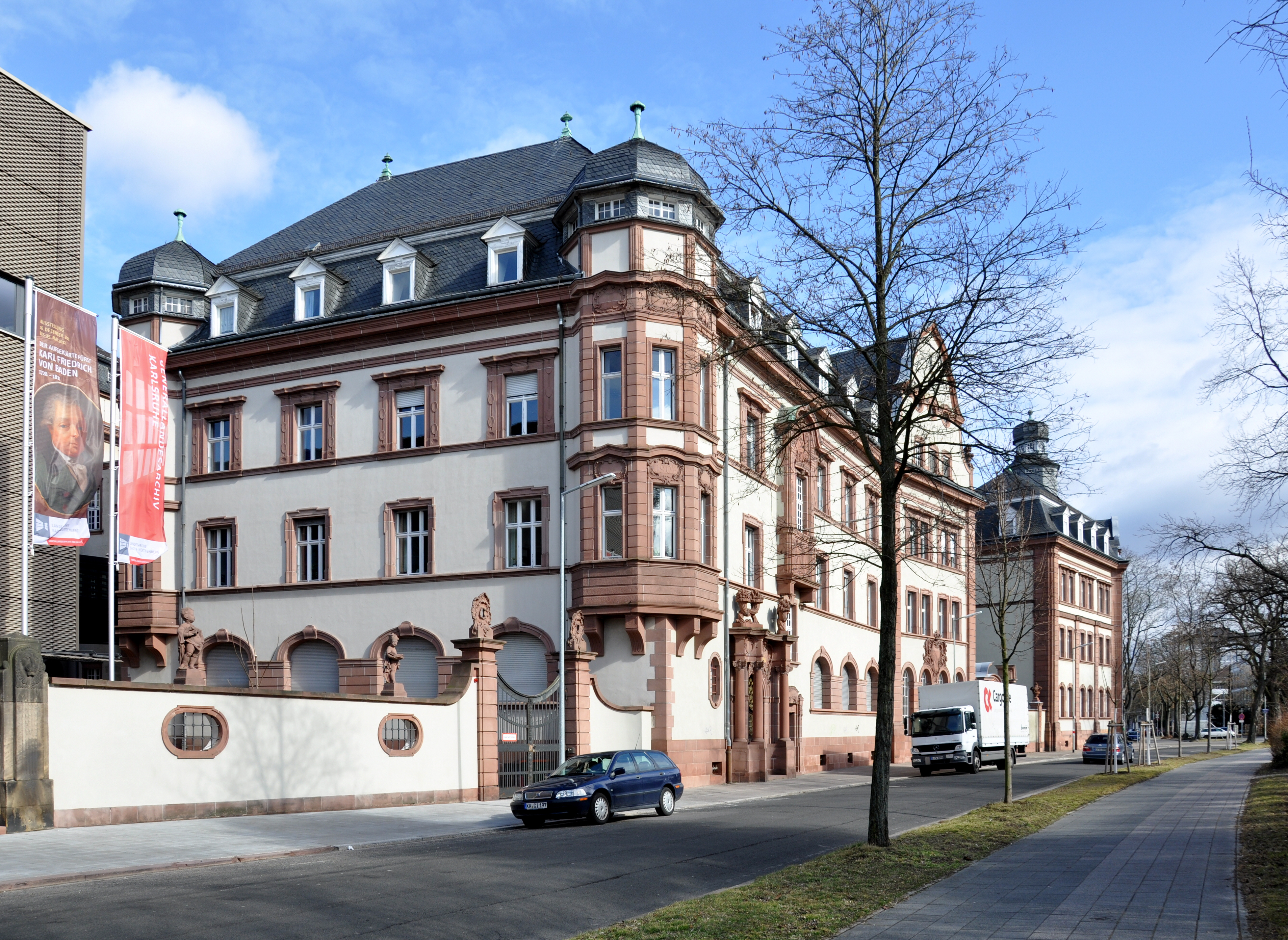 Historisches Gebäude des Generallandesarchivs Karlsruhe in der Karlsruher Weststadt. Rechts im Hintergrund das Gebäude des Verwaltungsgerichts.